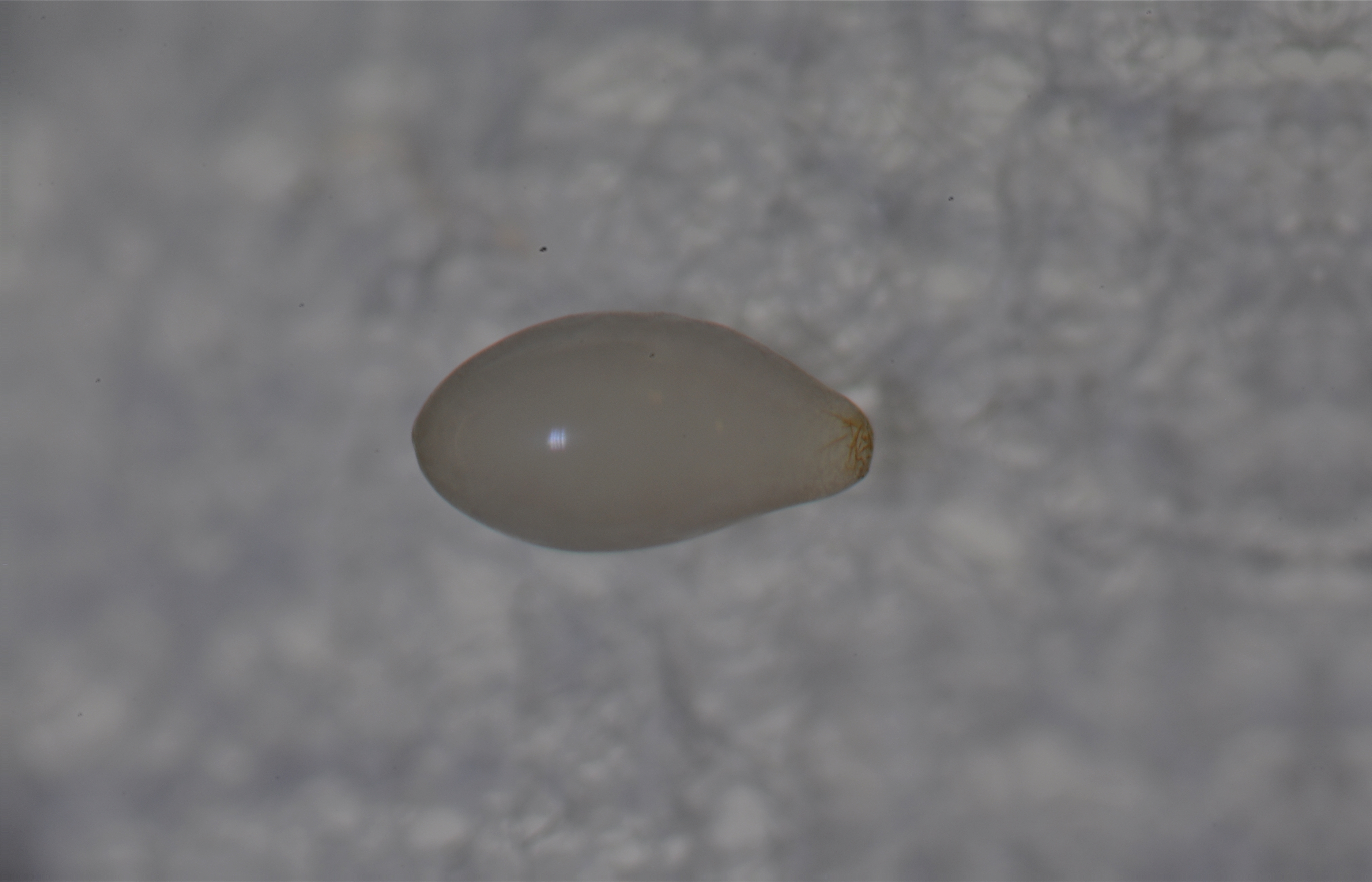 Ei des Geisterfischchens (Ctenolepisma calva) aus Chemnitz, Sachsen, Deutschland.